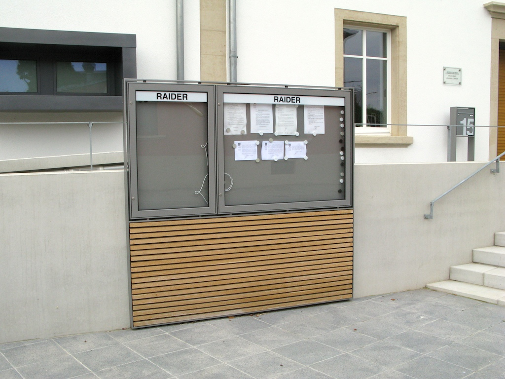 De Reider virun der Gemeng Garnech.